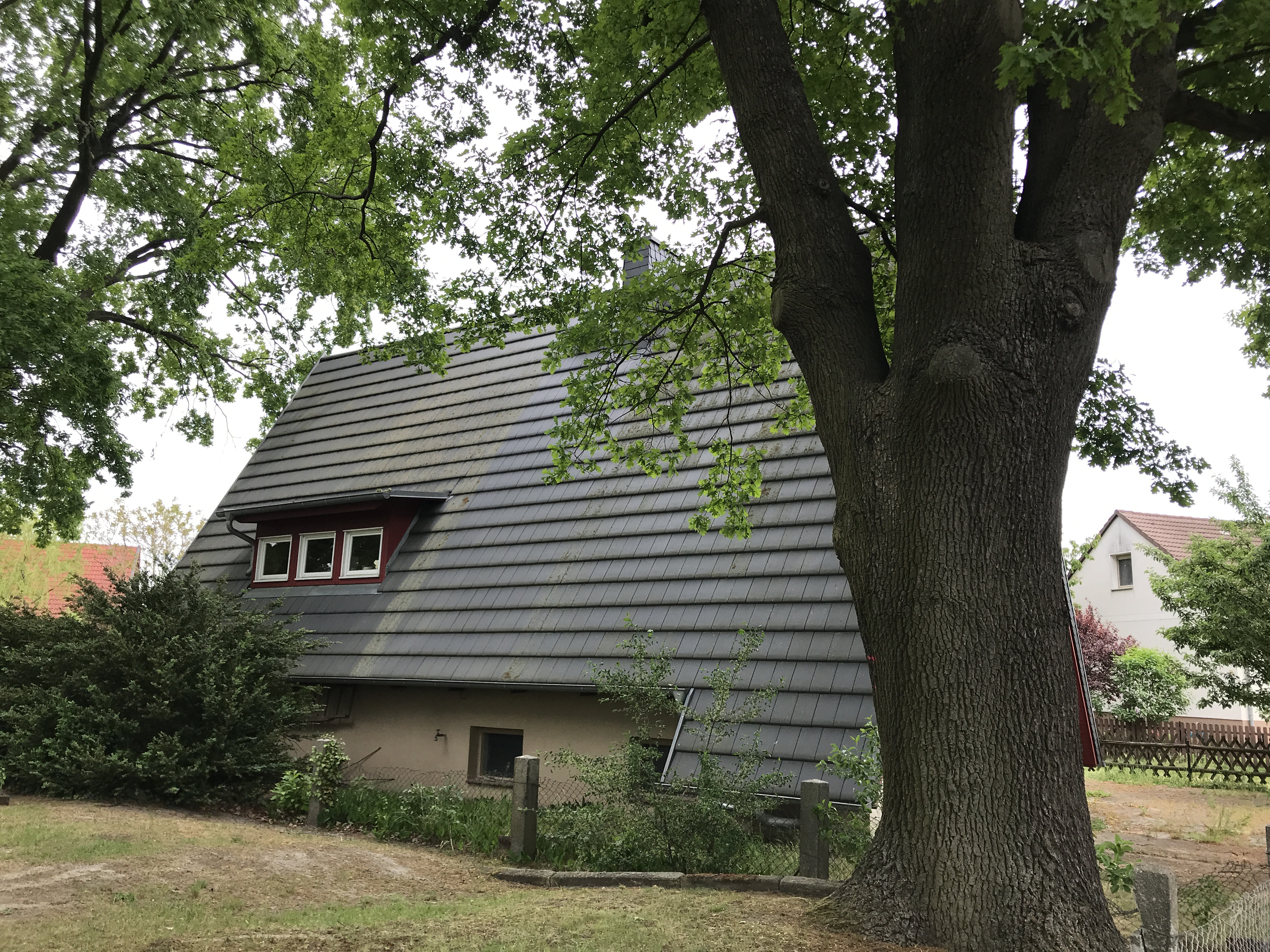 Die Dorfkirche Felgentreu in der Gemeinde Nuthe-Urstromtal ist eine neuzeitliche Saalkirche im Landkreis Teltow-Fläming in Brandenburg. Die Kirchenausstattung ist neuzeitlich.